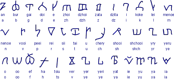 Ehemalige Schrift der finno-ugrischen Sprache Komi (altpermisch)